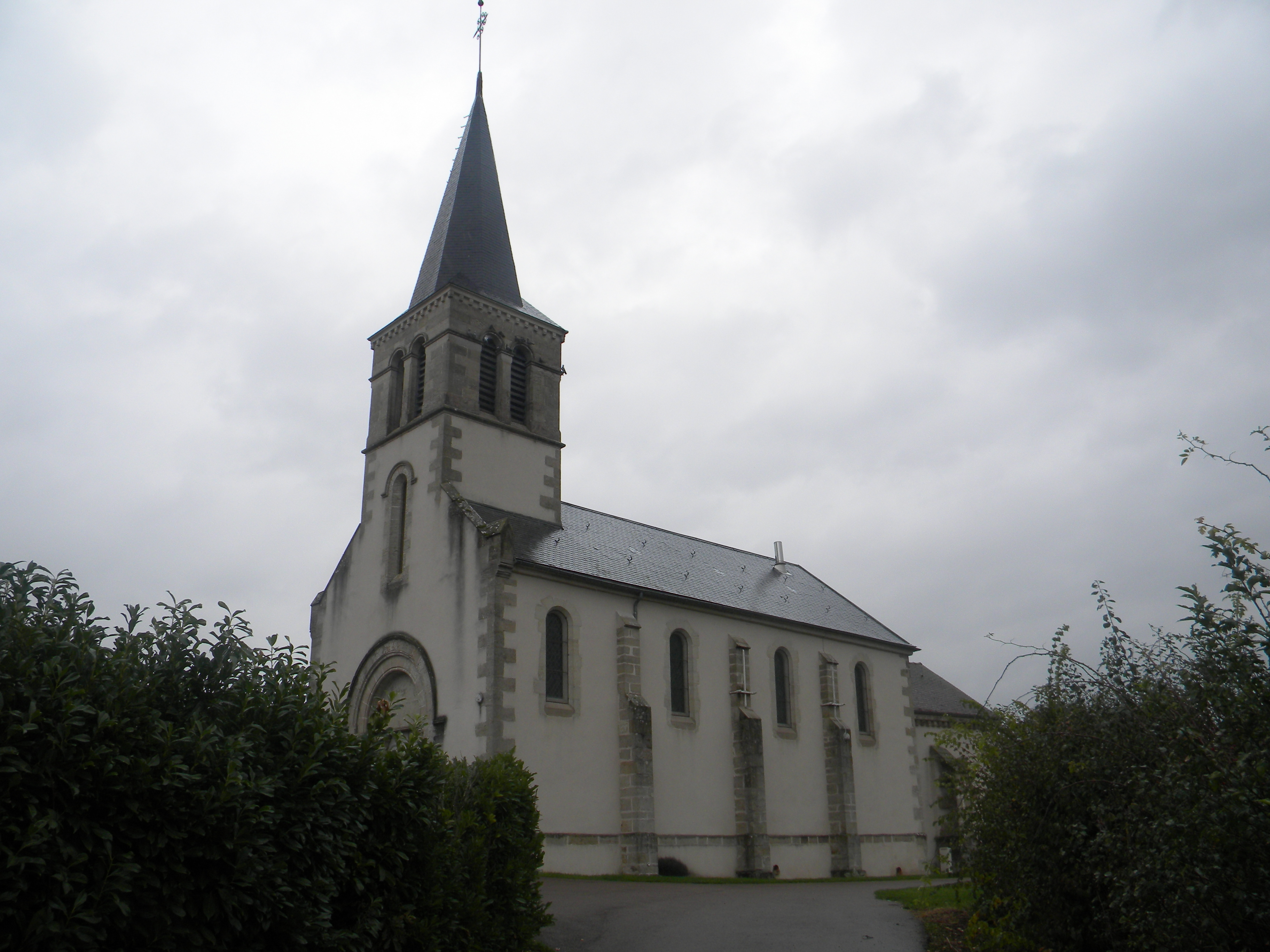 Pregxejo omage al Johano la Baptisto